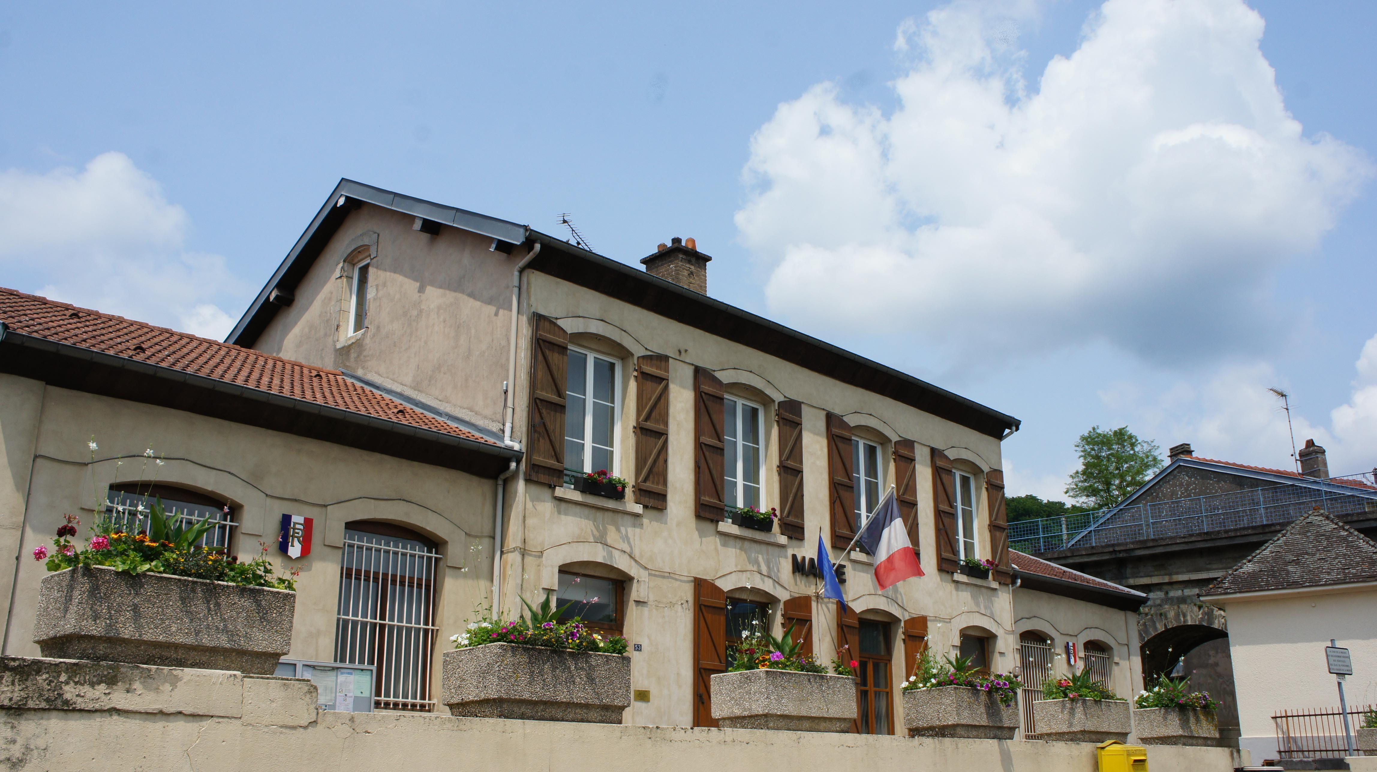 vue de la mairie de Chavigny (Meurthe-et-Moselle).